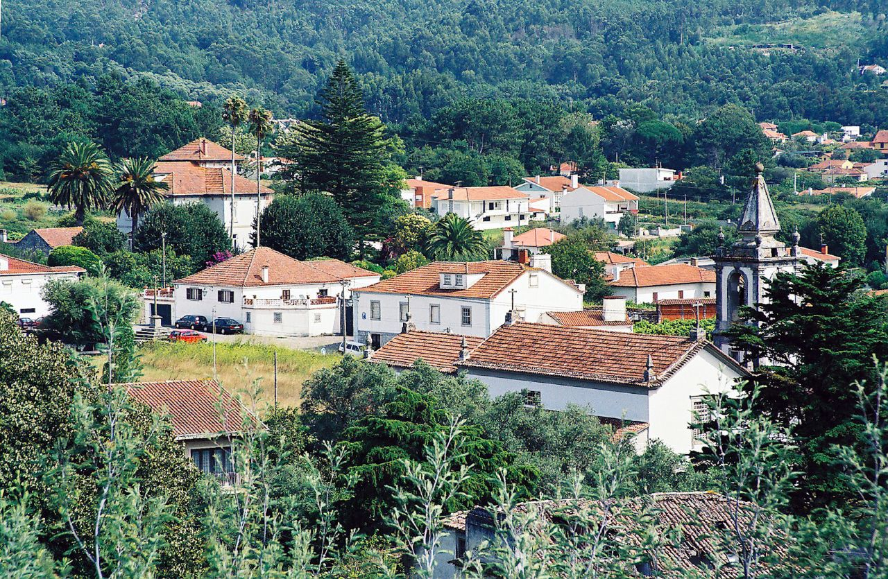 Afife